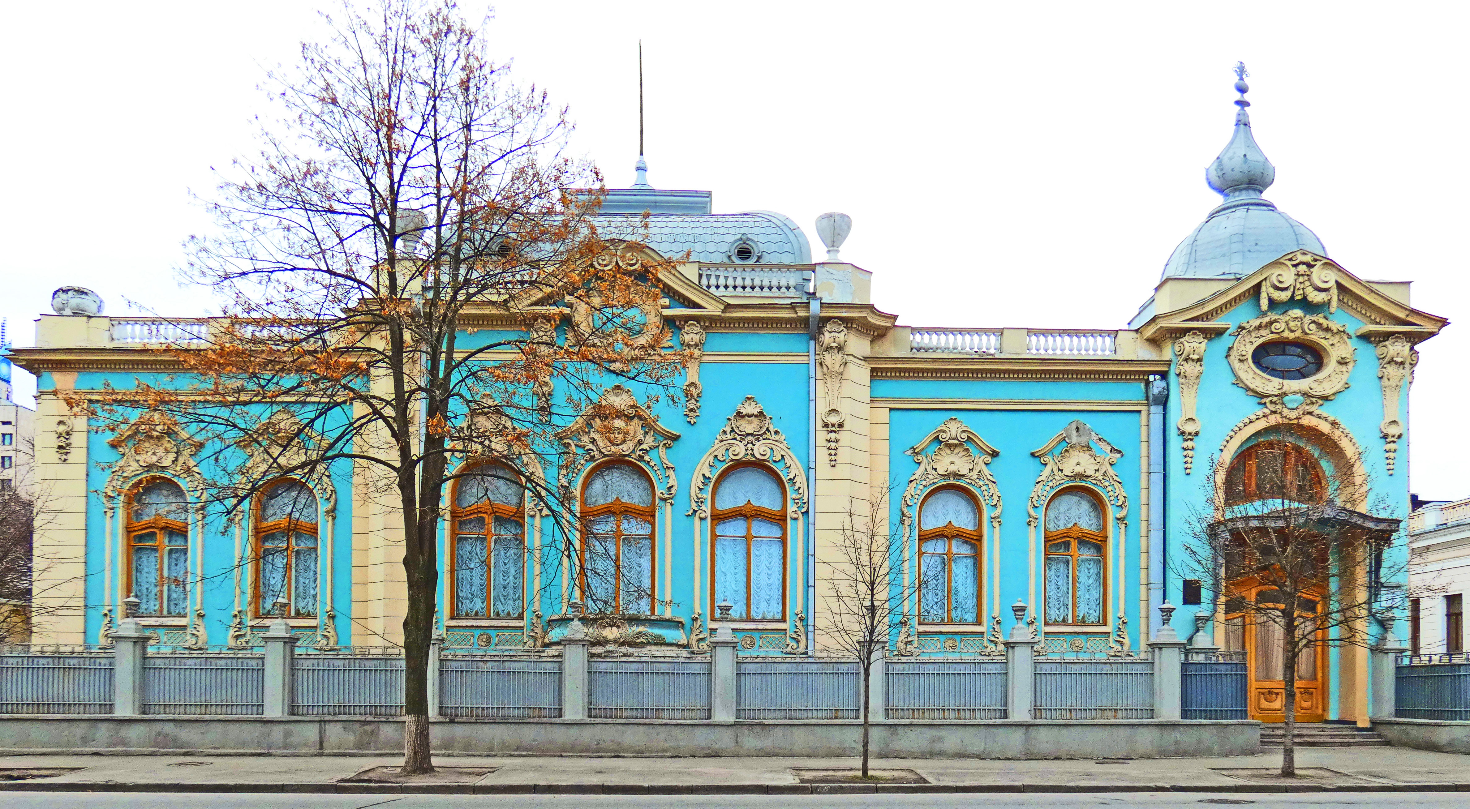 Маєток Я. Л. Полякова, Київ, вулиця Михайла Грушевського, 22